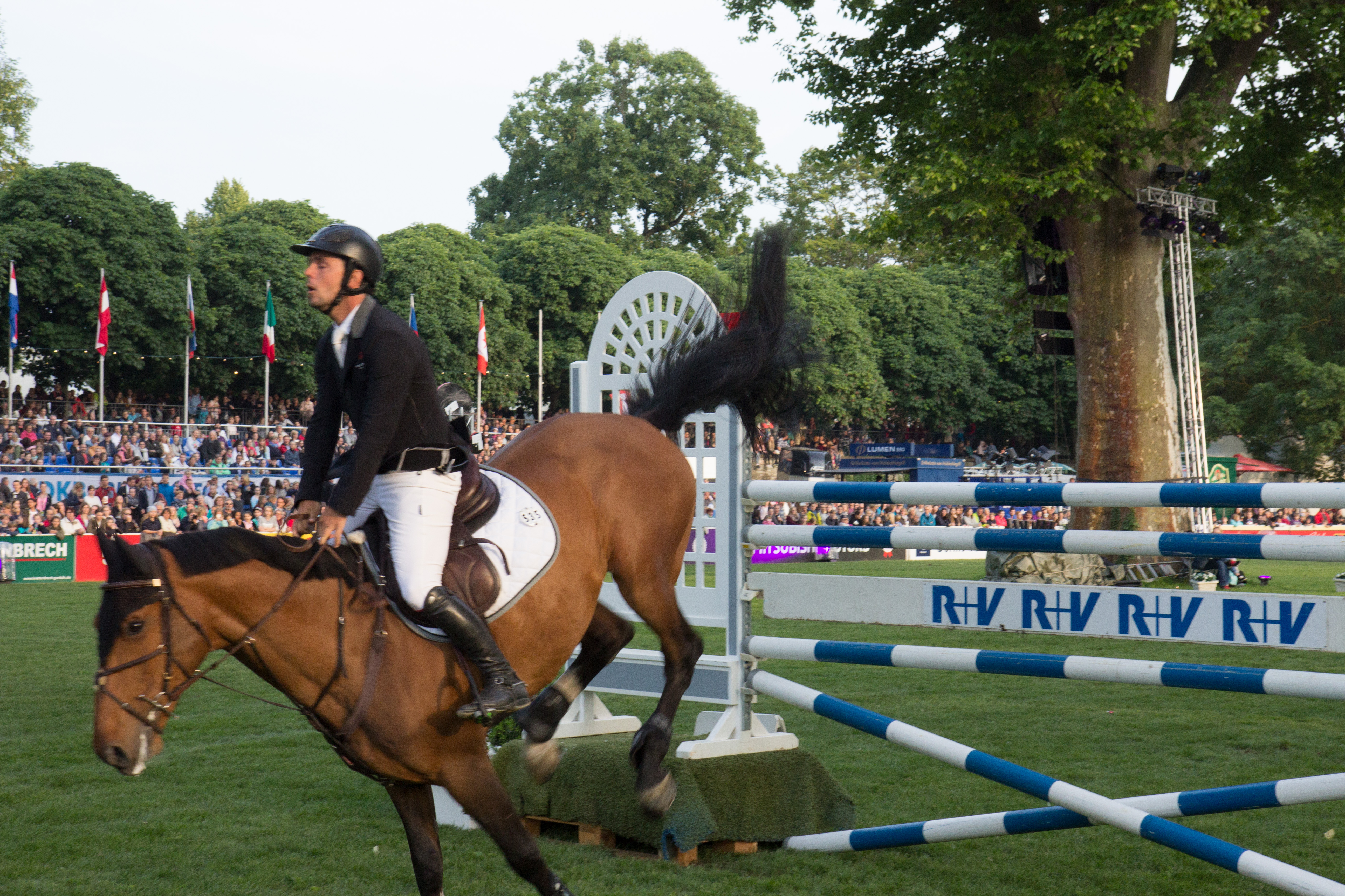 Internationales Wiesbadener Pfingstturnier 2018. CSI 4* Barrierenspringprüfung KI.S * Six Bars Berrierenspringen "Preis der R+V Versicherung": Sergio Alvarez Moya auf G&C Wolf